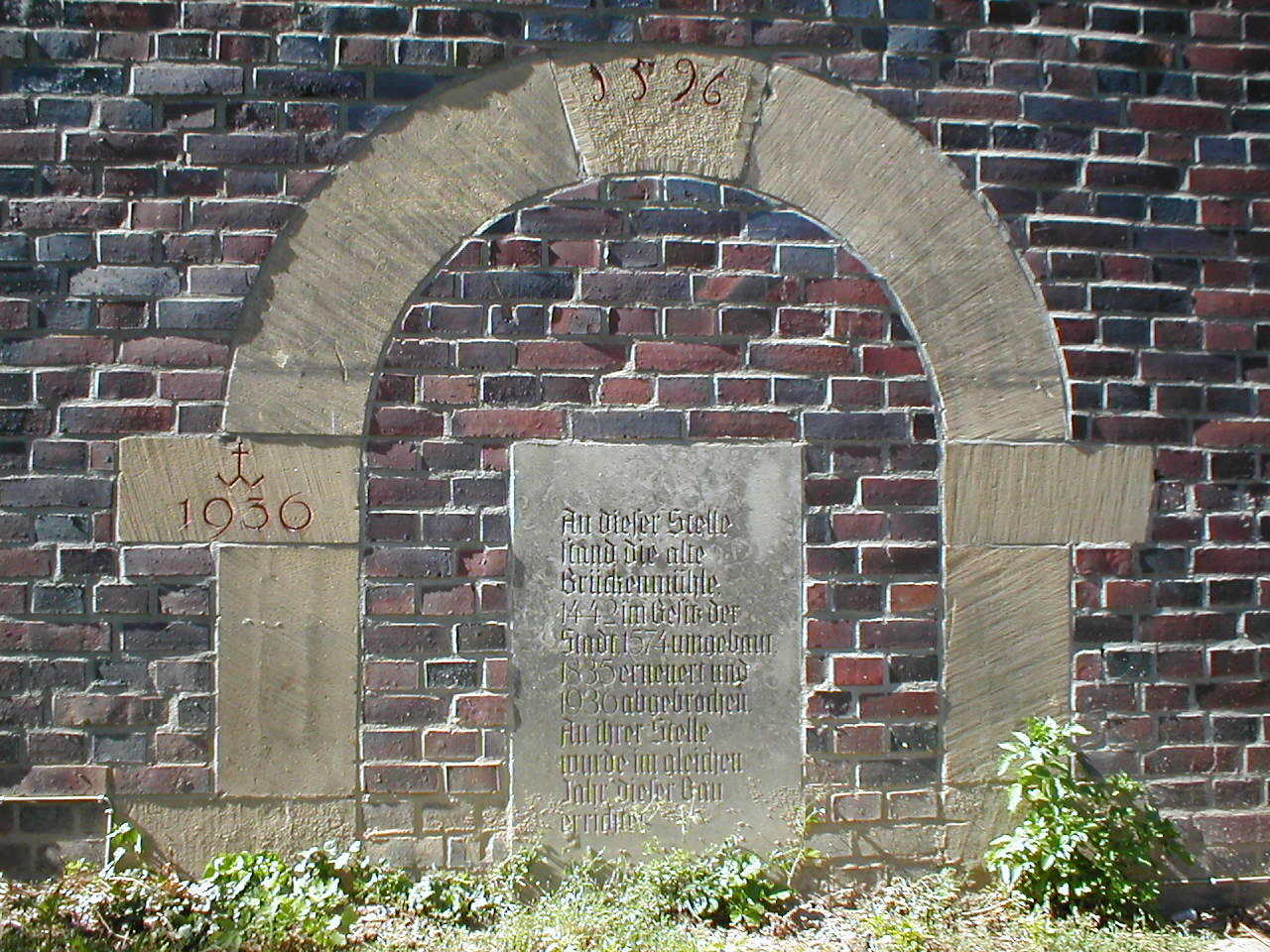 Gedenkstein für die Brückenmühle am 1936 errichteten Hagenbucher auf der Kraneninsel, Heilbronn